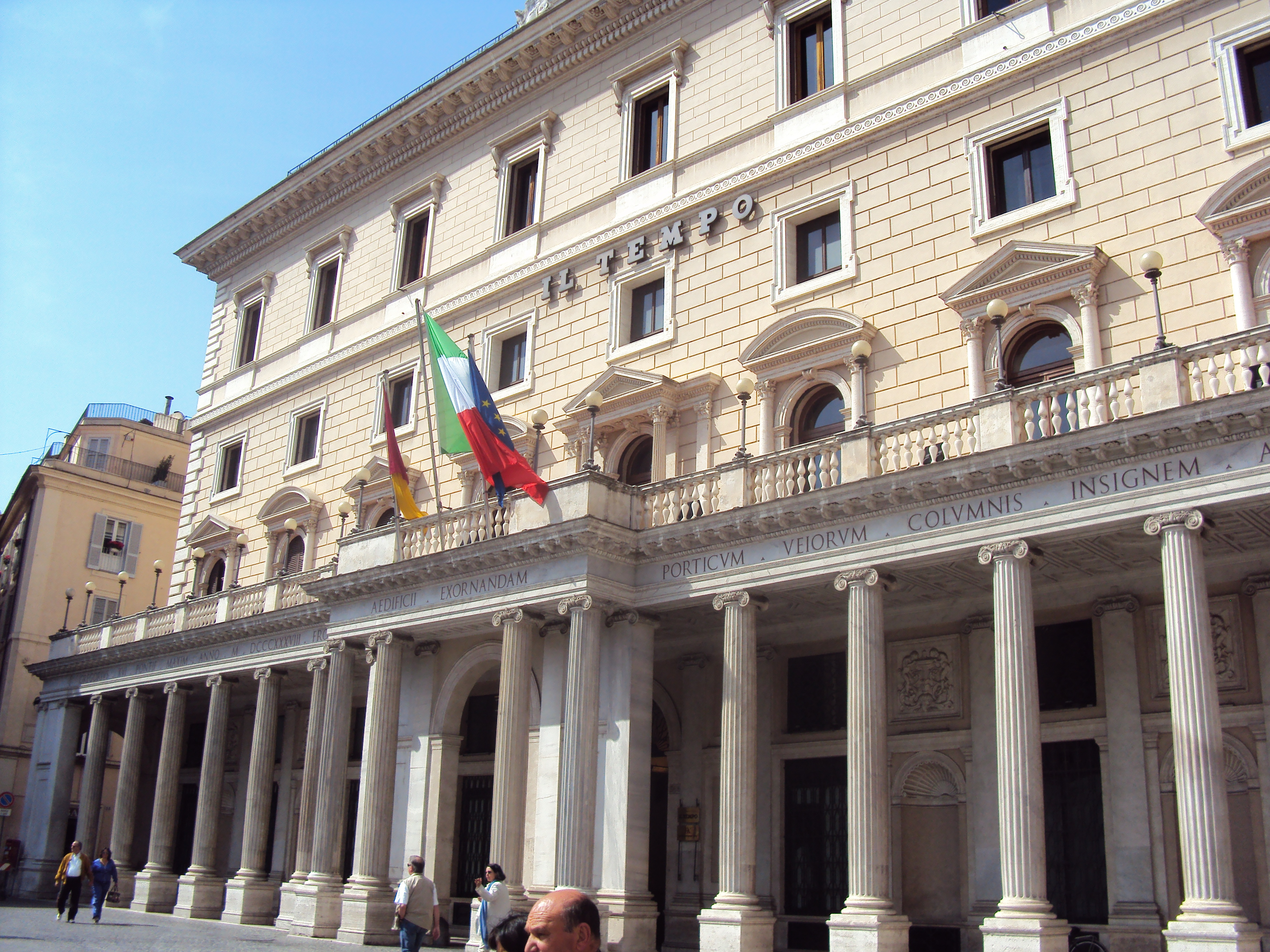 Palazzo Wedekind, Roma